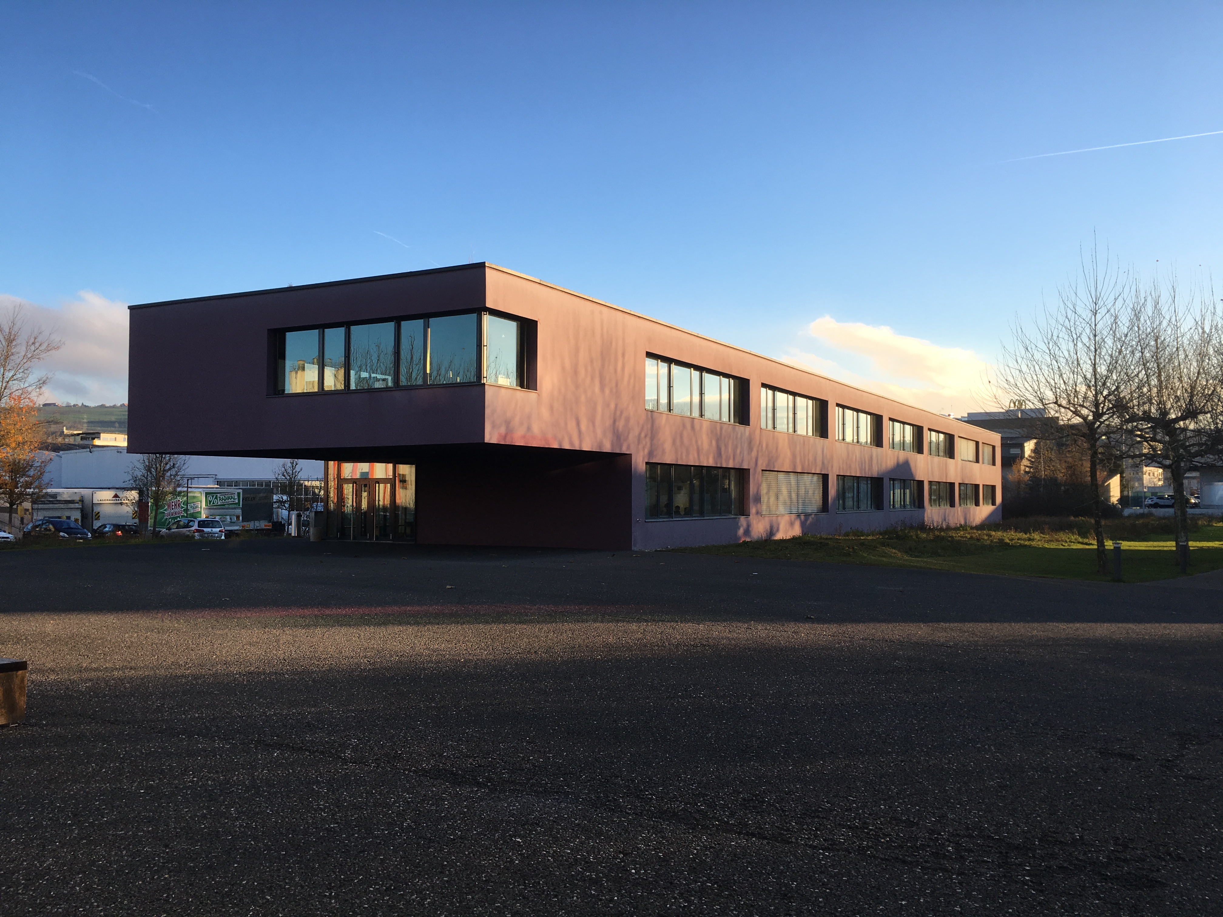 Der Erweiterungsbau von Franz Amberg&Hess+Partner AG wurde 2005 vollendet.